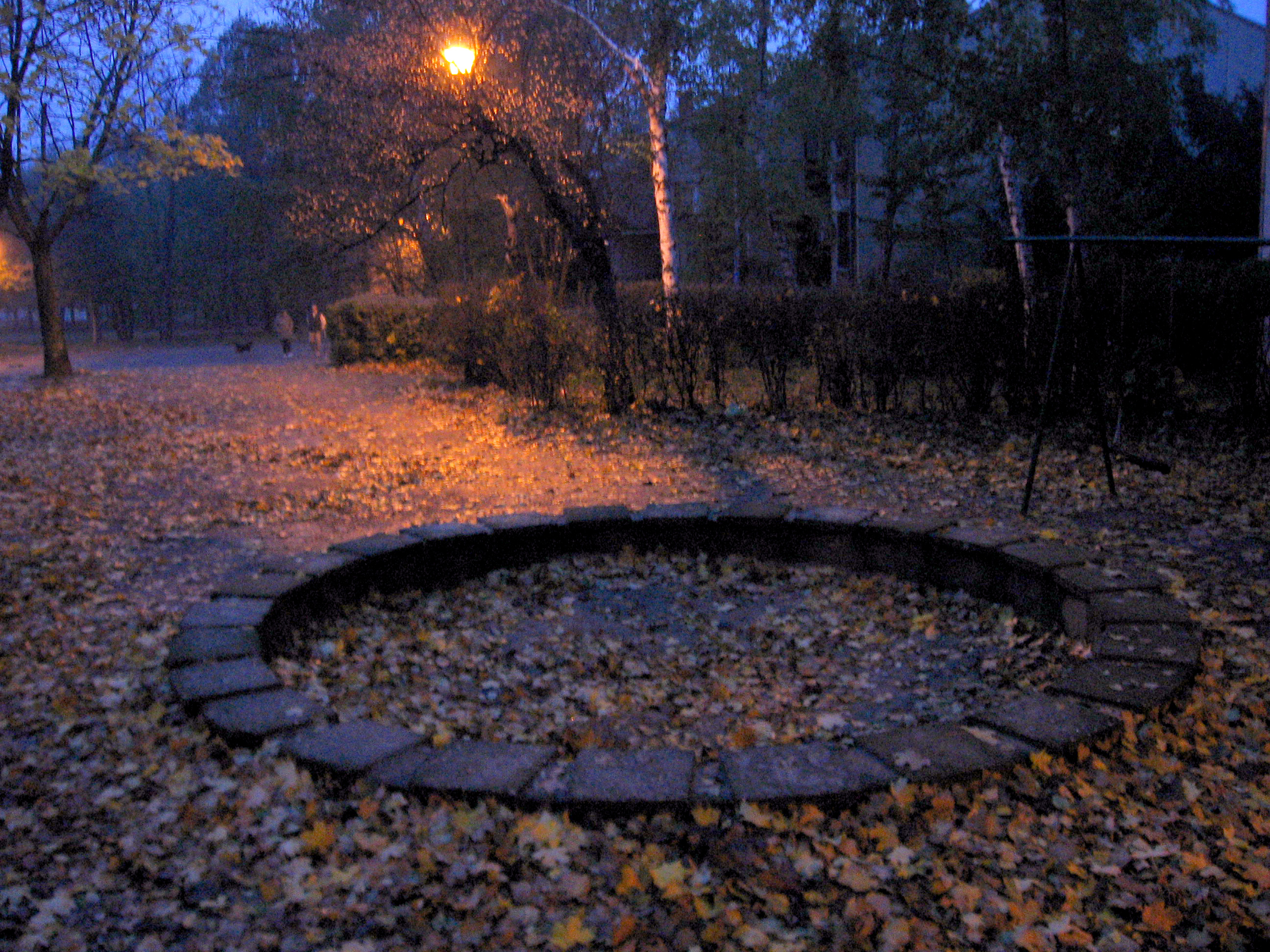 Igraliste u Belim Vodama